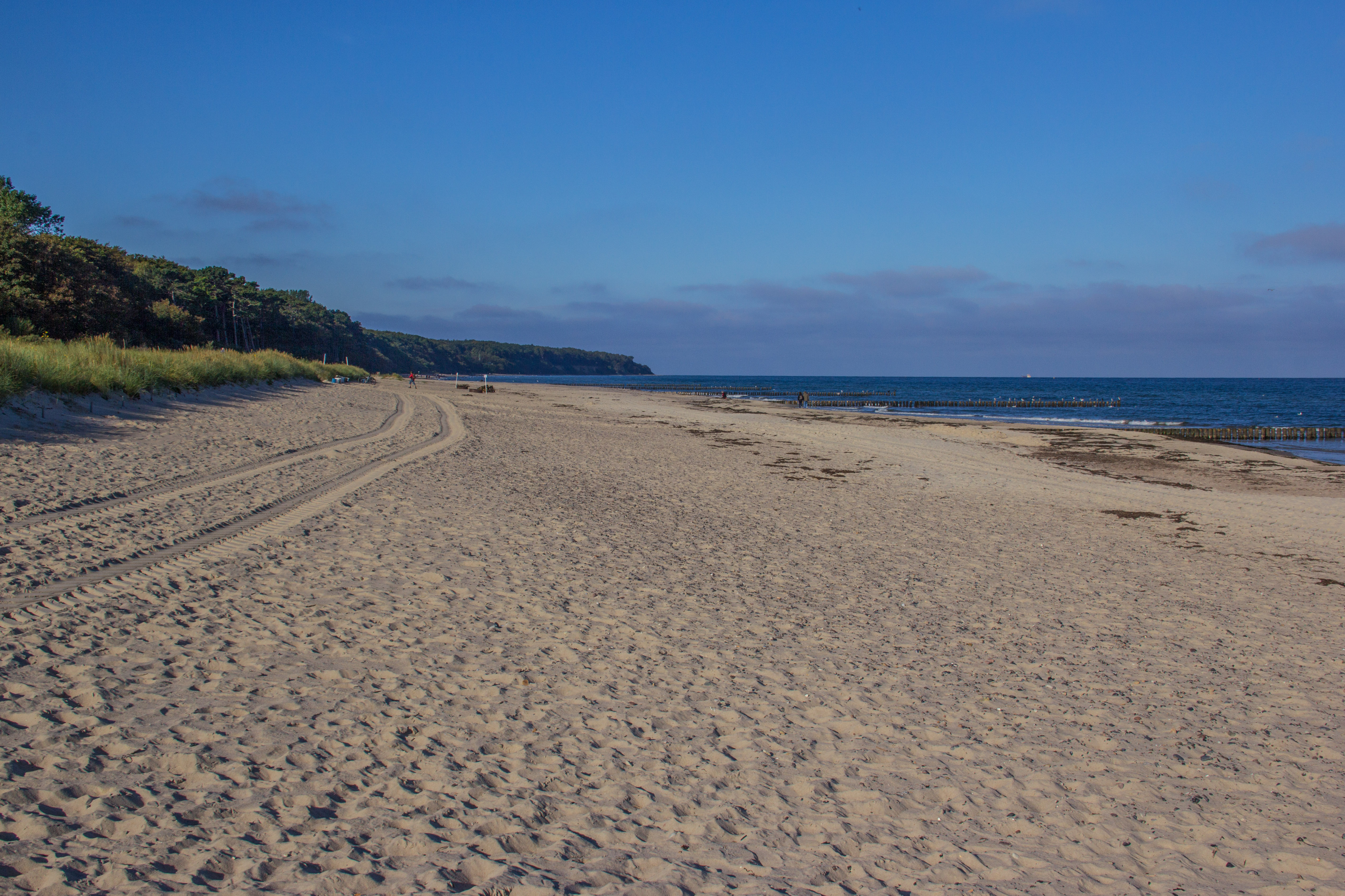 Naturschutzgebiet Stoltera, Warnemünde, Strand